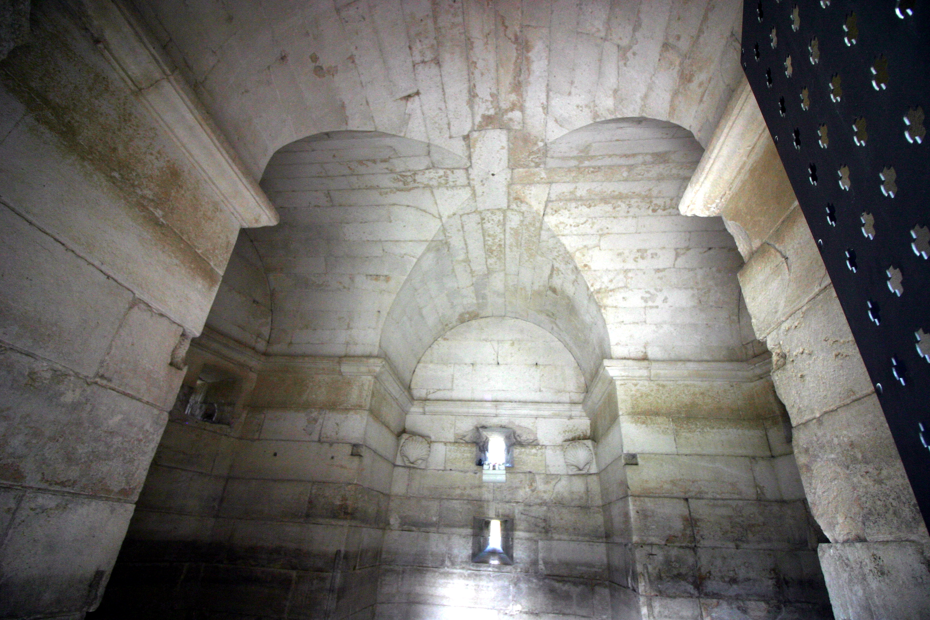 Mausoleum of Theodoric - Ravenna